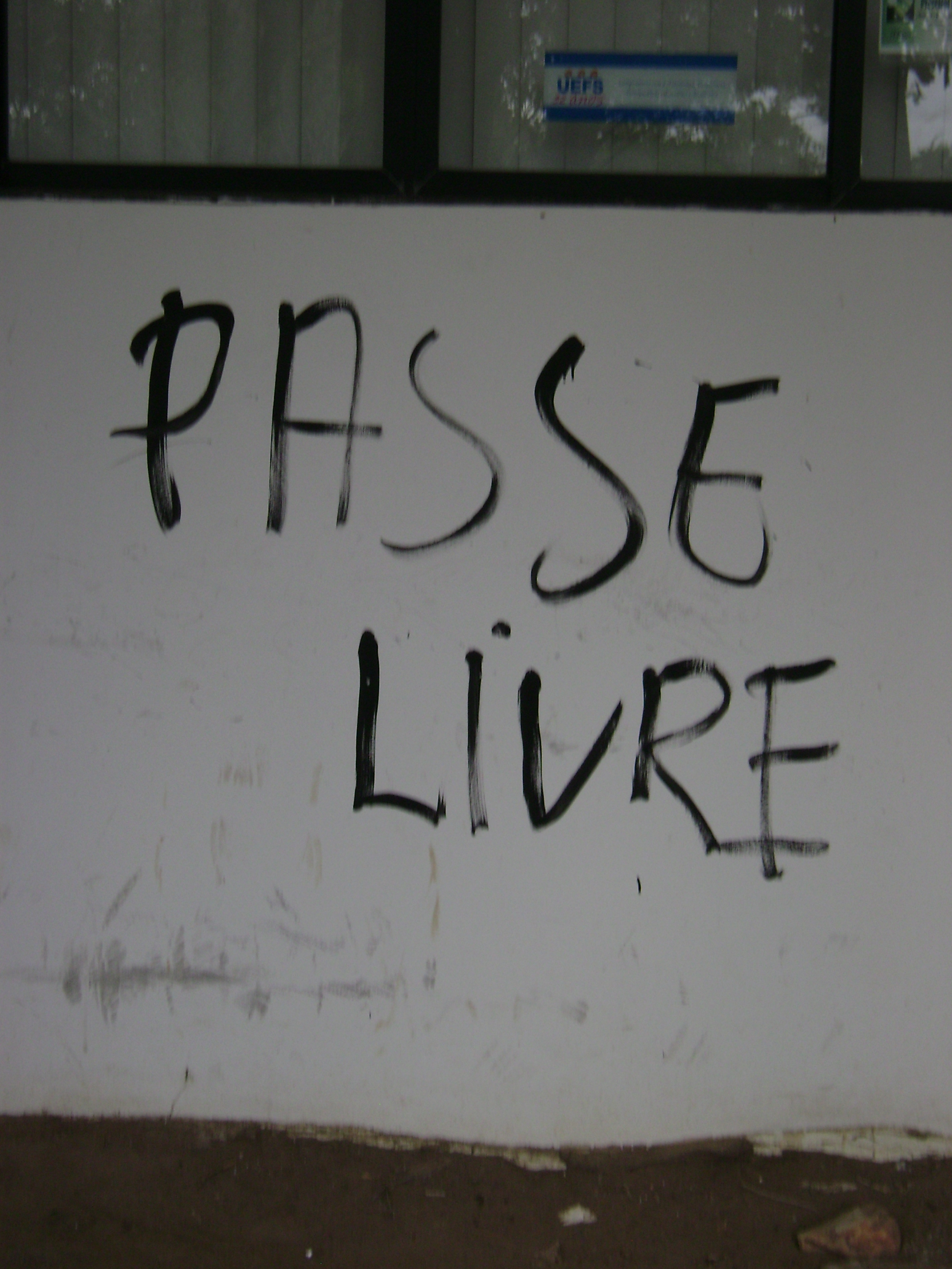 Pichação Passe Livre em parede de edificação dentro da UEFS, em Feira de Santana, Bahia, Brasil.